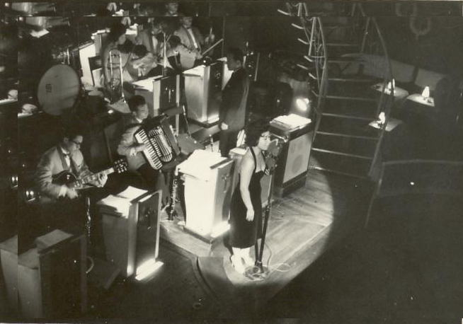 羽田隼子のステージ写真